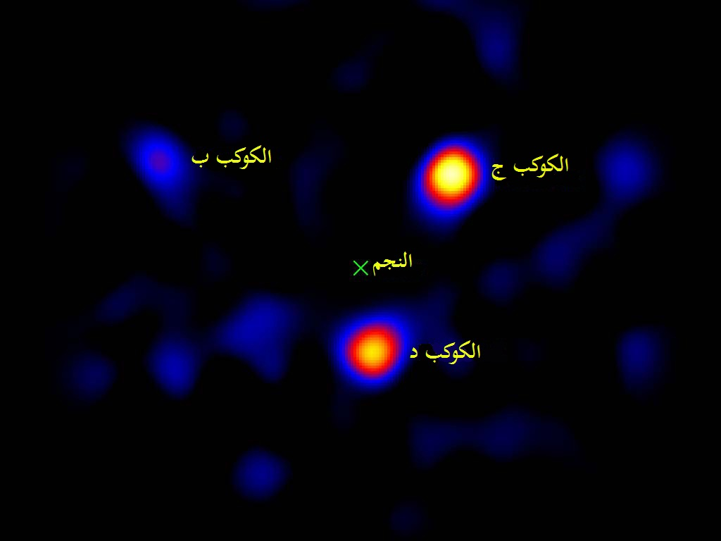 صُورةٌ تُظهر الضوء المُنبعث من ثلاثة كواكب تدور حول أحد النُجوم على بُعد 120 سنة ضوئيَّة من الأرض. يقعُ نجم هذه الكواكب في وسط الصُورة حيثُ علامة X، ويُعرف باسم HR8799. التُقطت هذه الصُورة باستخدام جزء بسيط من مقراب (تلسكوپ) مرصد پالومار، يبلغ 1.5 أمتار (4.9 أقدام)، شمال مدينة سان دييغو بِولاية كاليفورنيا الأمريكيَّة. كانت هذه هي المرَّة الأولى التي يتمُّ فيها التقاط صورٍ لِكواكب تقع خارج المجموعة الشمسيَّة باستخدام مقراب ذو مرآة بسيطة، إذ أنَّ الصُور السابقة كانت تُلتقط بواسطة تلسكوپات أضخم. يُعتقد بأنَّ الكواكب الثلاثة غازيَّة عملاقة كما كوكب المُشتري، إلَّا أنها أكبر حجمًا. وهي تدور حول نجمها على بُعد 24 و38 و68 مرَّة (على التوالي) من المسافة التي تفصلُ الأرض عن الشمس.